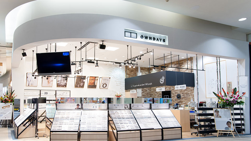 OWNDAYS SHOP